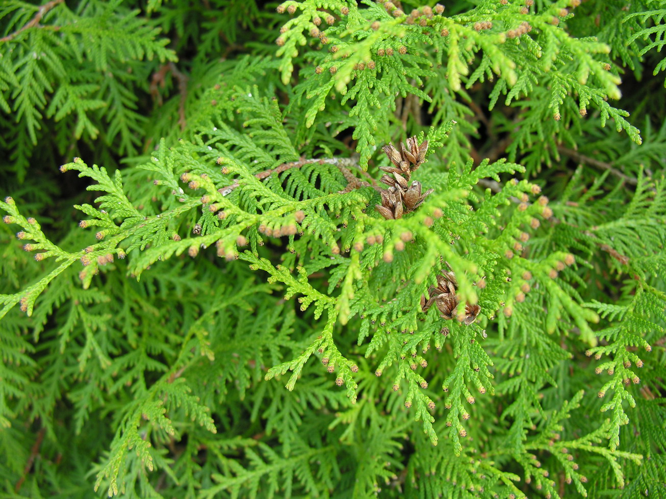 Vakarinė tuja (Thuja occidentalis) Šeima. Kiparisiniai (Thuja occidentalis) Foto: Algirdas, 2006 m. gegužės 3 d., Lietuva